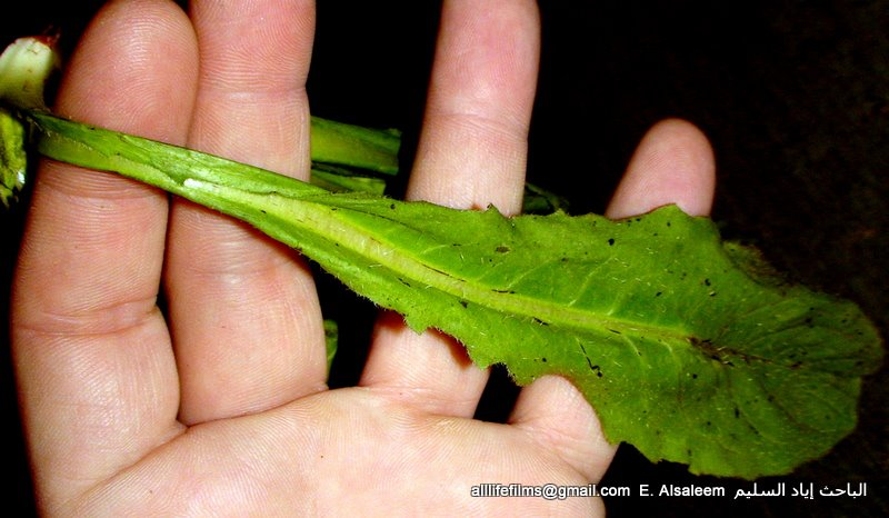 نباتات برية سورية تؤكل